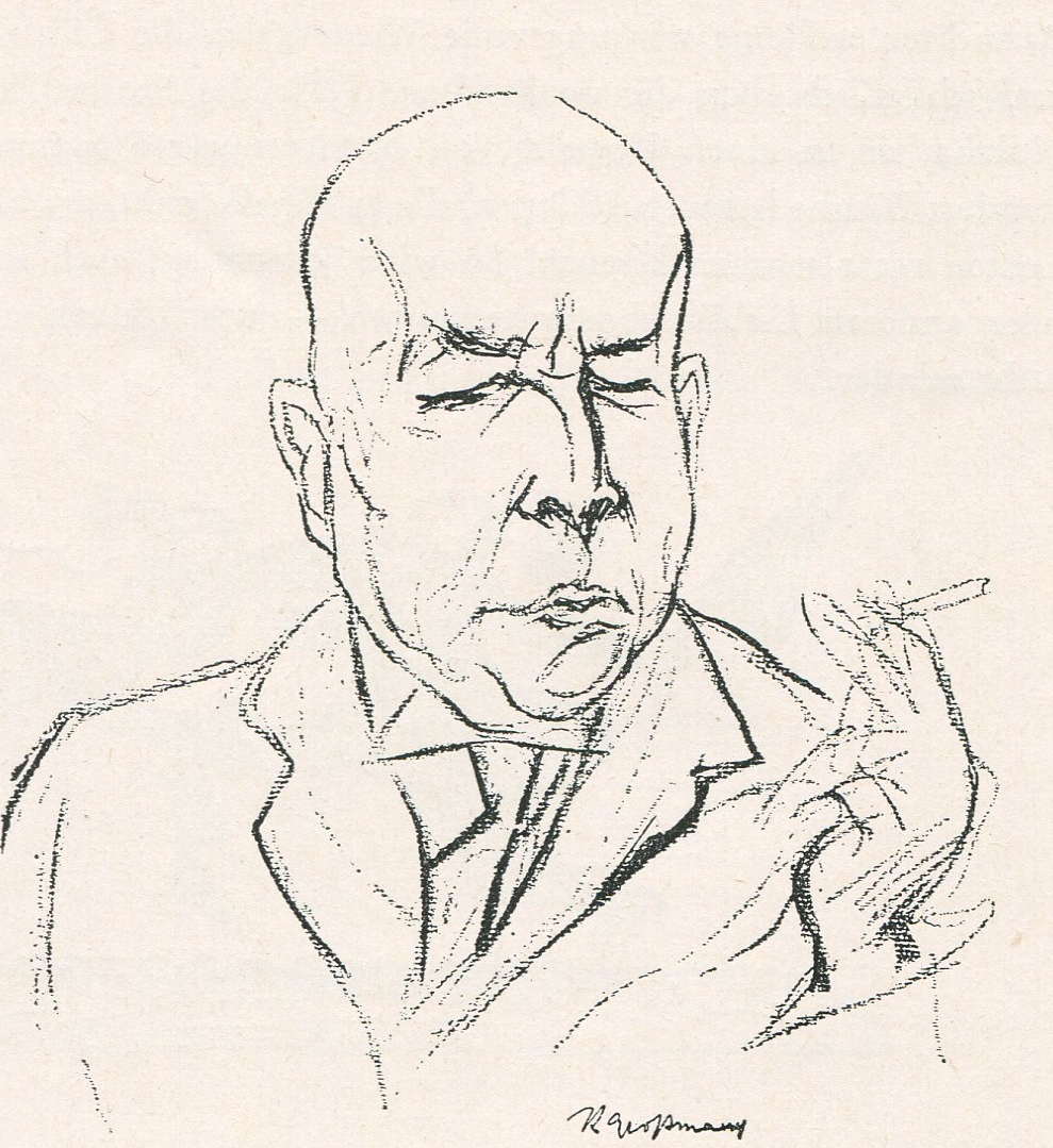 Oswald Spengler, Zeichnung von Rudolf Großmann 1922